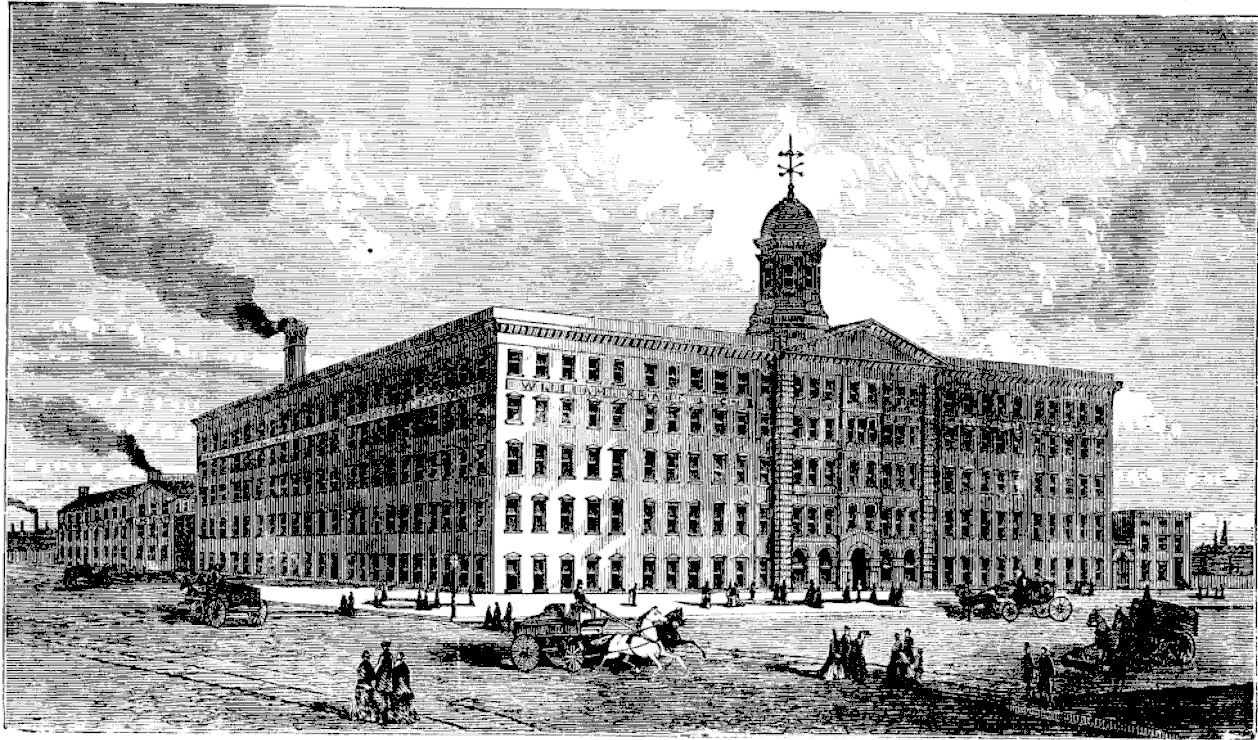 engraving from Wm. Knabe & Co. advertisement